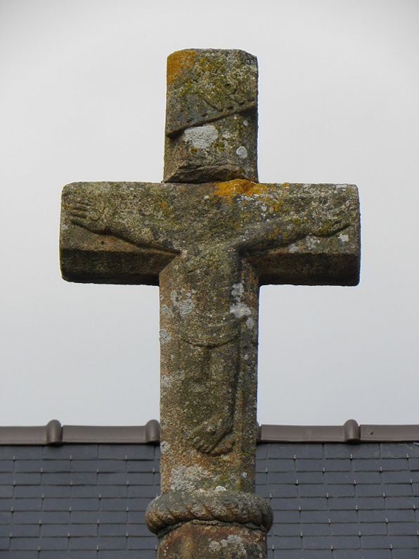 Croix Prieuré d'Ardevon (50).